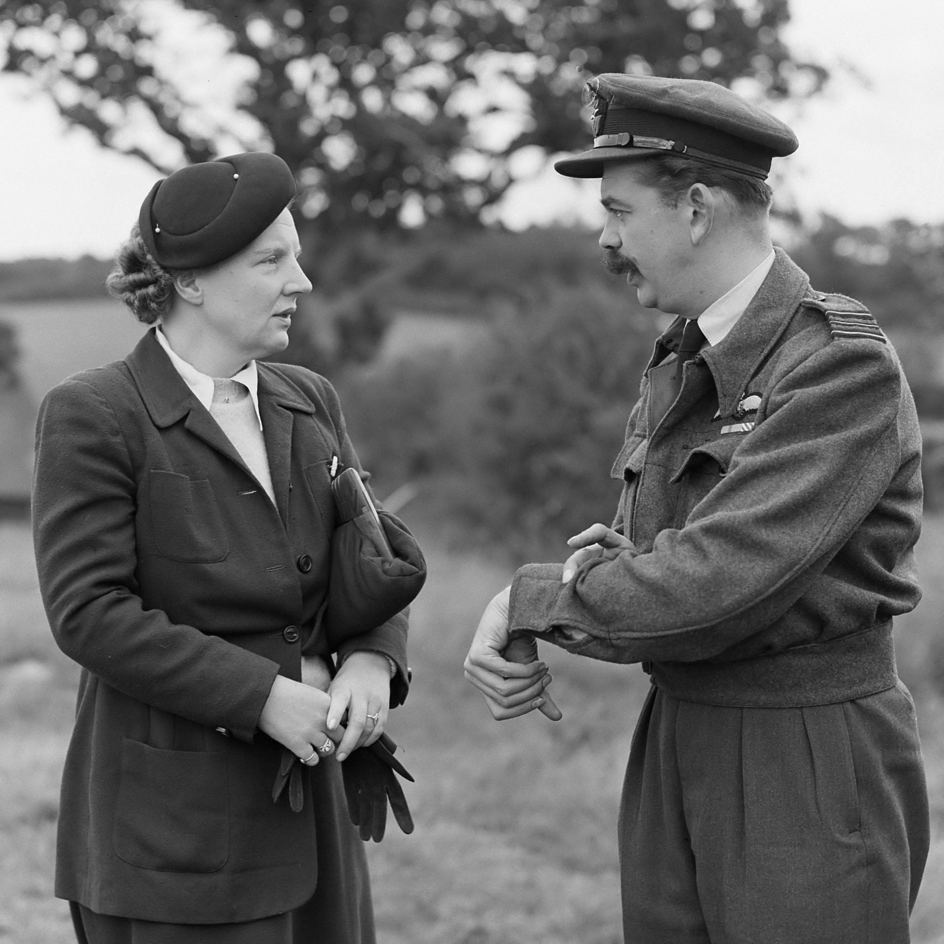 Bezoek prinses Juliana aan 322 (Dutch) Squadron RAF te Deanland. Prinses Juliana in gesprek met Squadron Leader L.C.M. van Eendenburg 26 september 1944